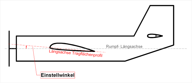 Einstellwinkel beim Flugzeug